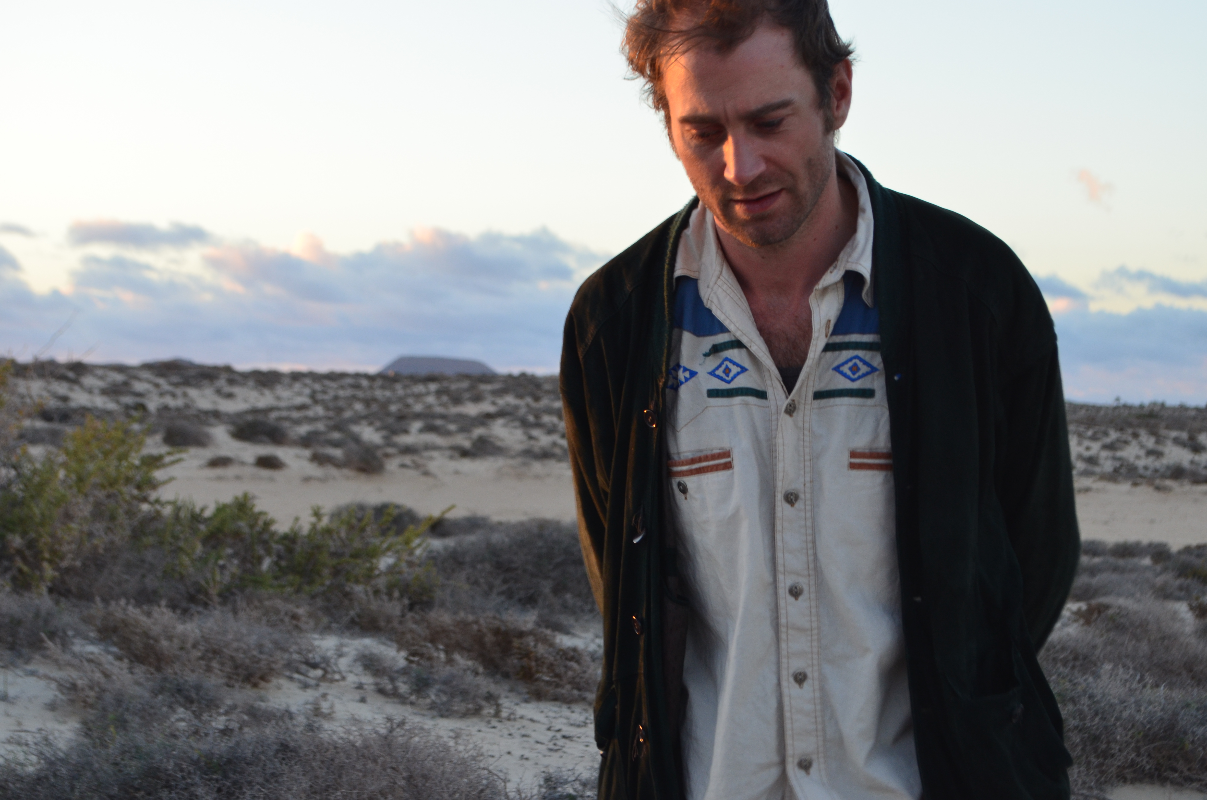 Swedish musician Tim Schmidt shot in the Spanish desert. The photograph was taken by HHeuser, 2017.